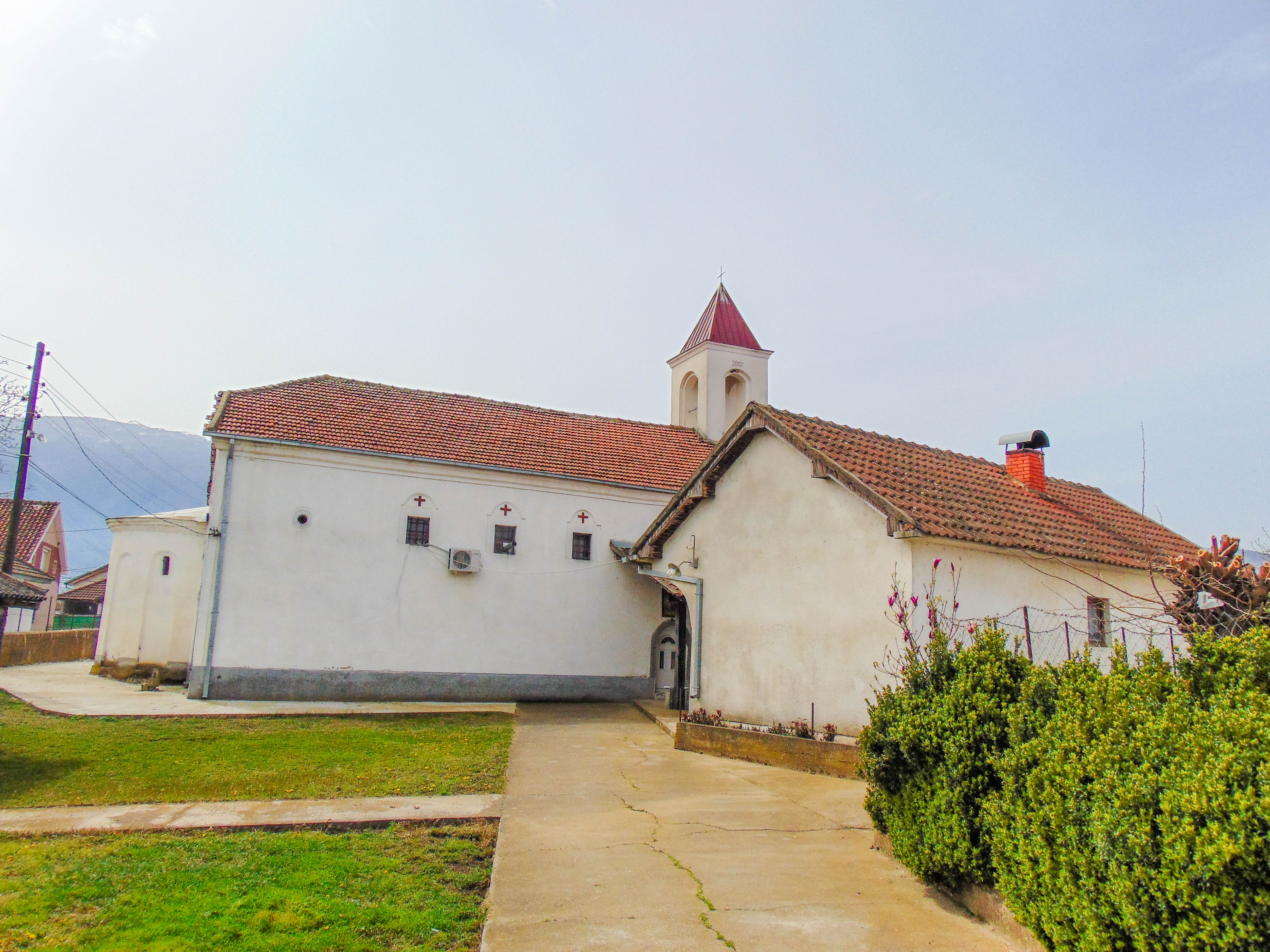 Црква „Св. Ѓорѓи“ - Зубово